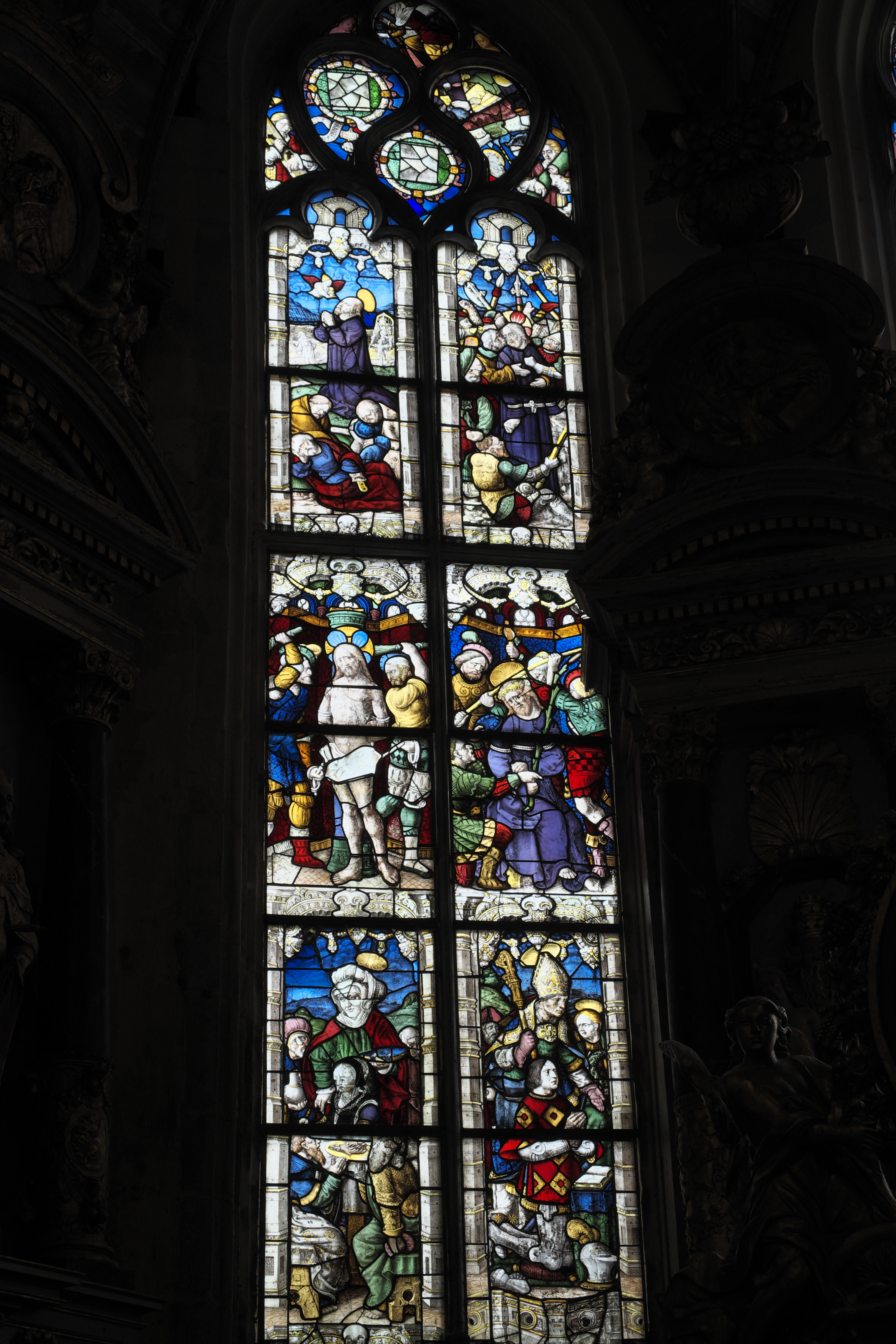 Katholische Pfarrkirche Saint-Salomon in La Martyre im Département Finistère (Region Bretagne/Frankreich), Bleiglasfenster (baie 1) aus dem 16. Jahrhundert; Darstellung: Szenen der Passion; unten Stifter: Isabeau d'Albret und René de Rohan